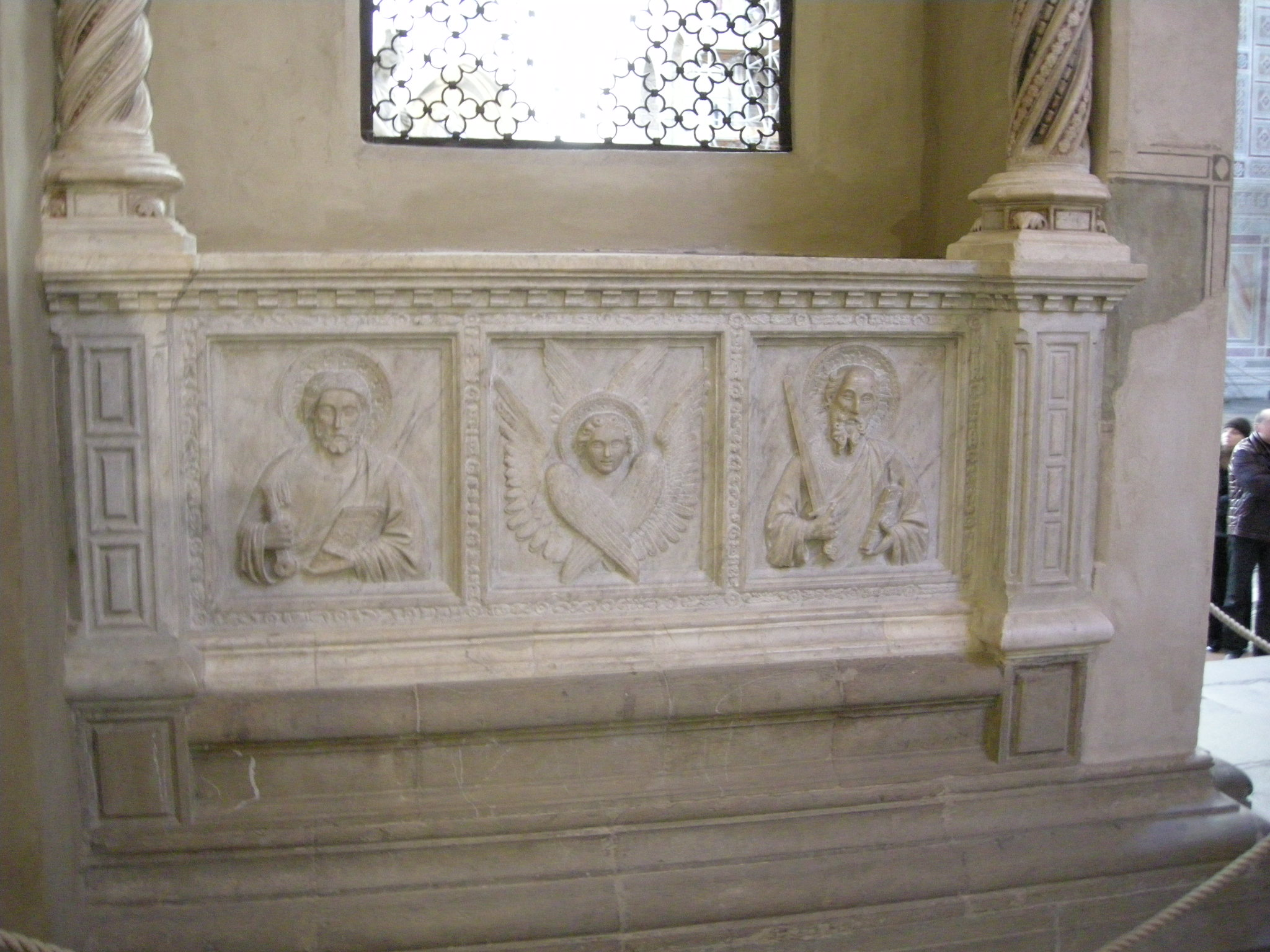 Cappella baroncelli, monum. di giovanni di balducci 1327, interno 01.JPG